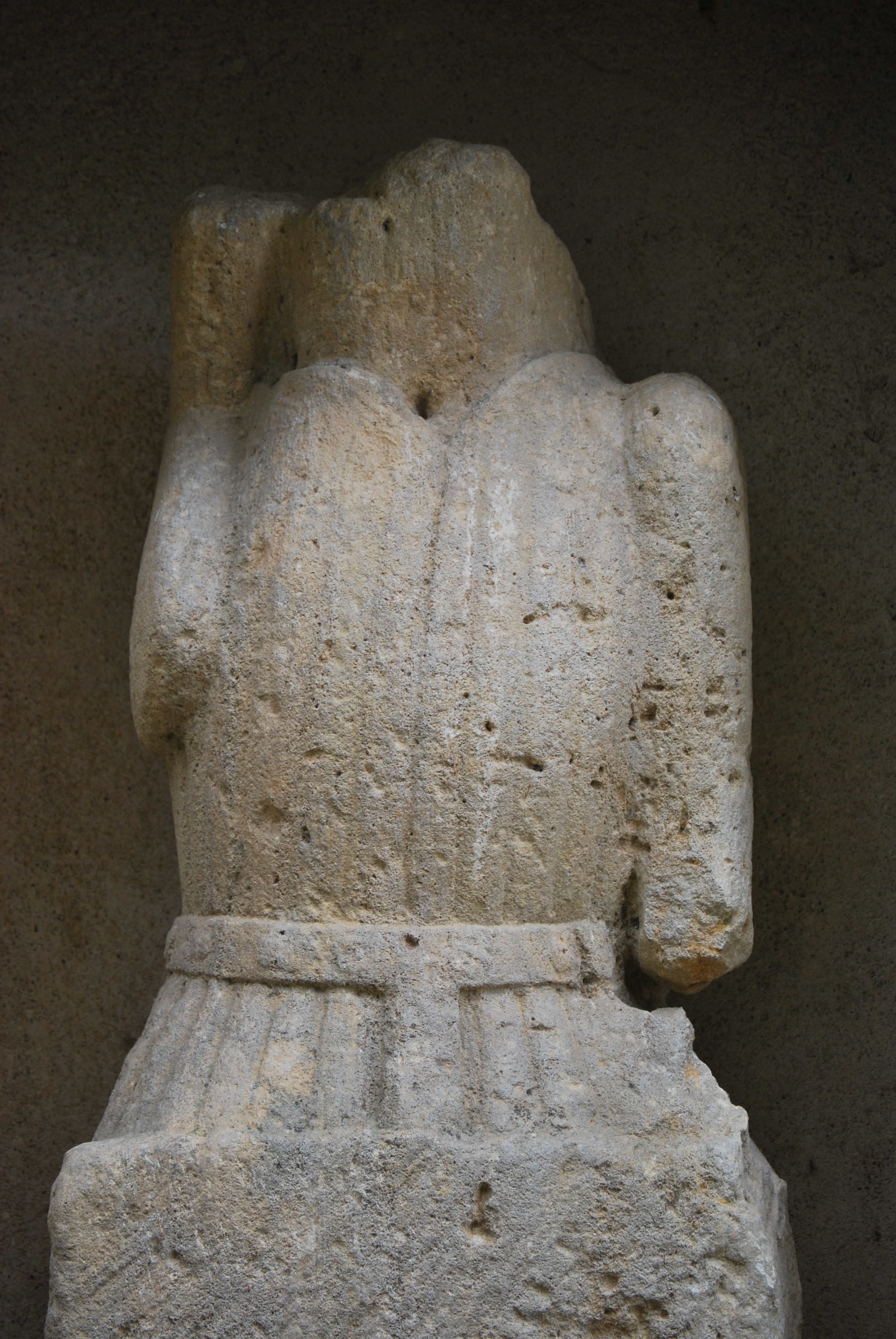 Gargouille provenant de l'ancien château de Baugy (Cher, France)